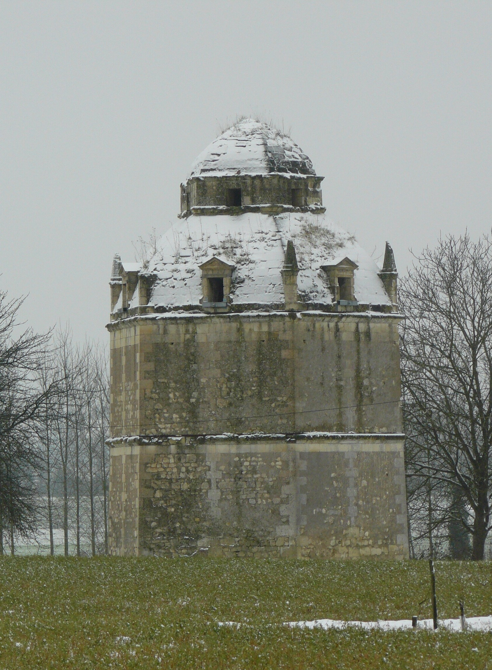 Pigeonnier de Panzoult